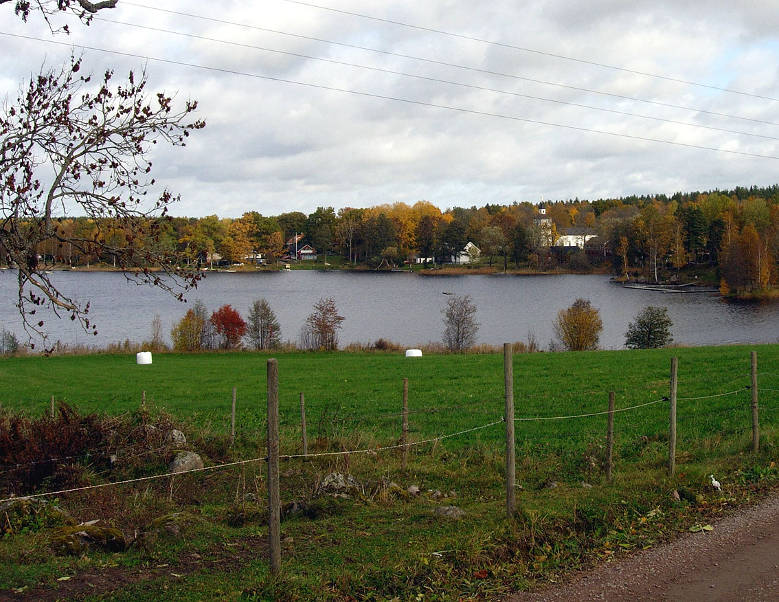 Trehörnasjön med Trehörna kyrka